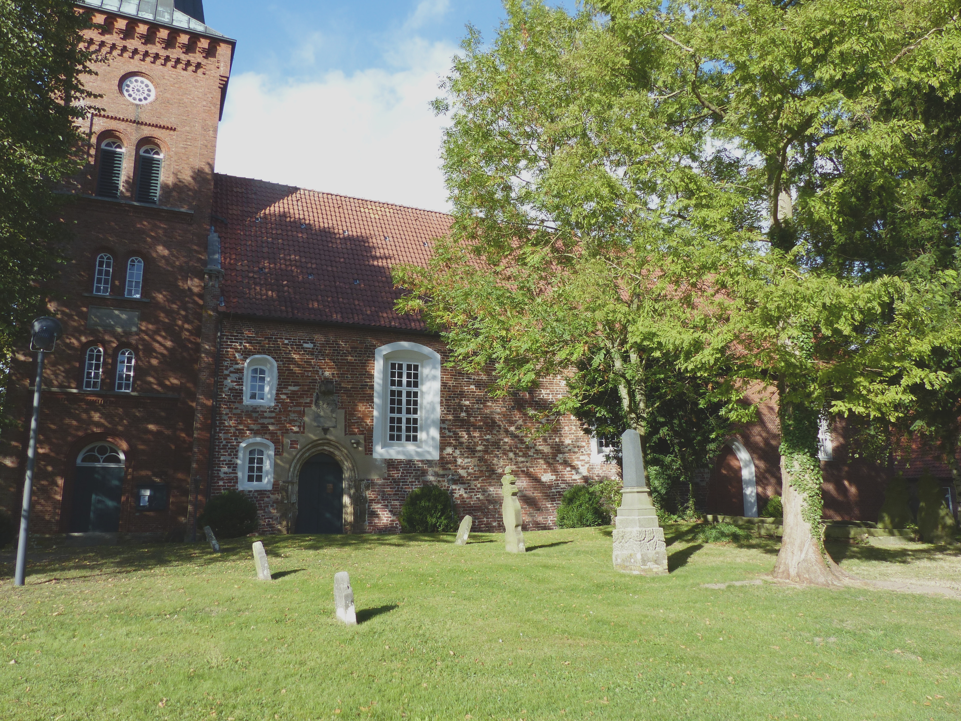 Kirche Dedesdorf, Südseite